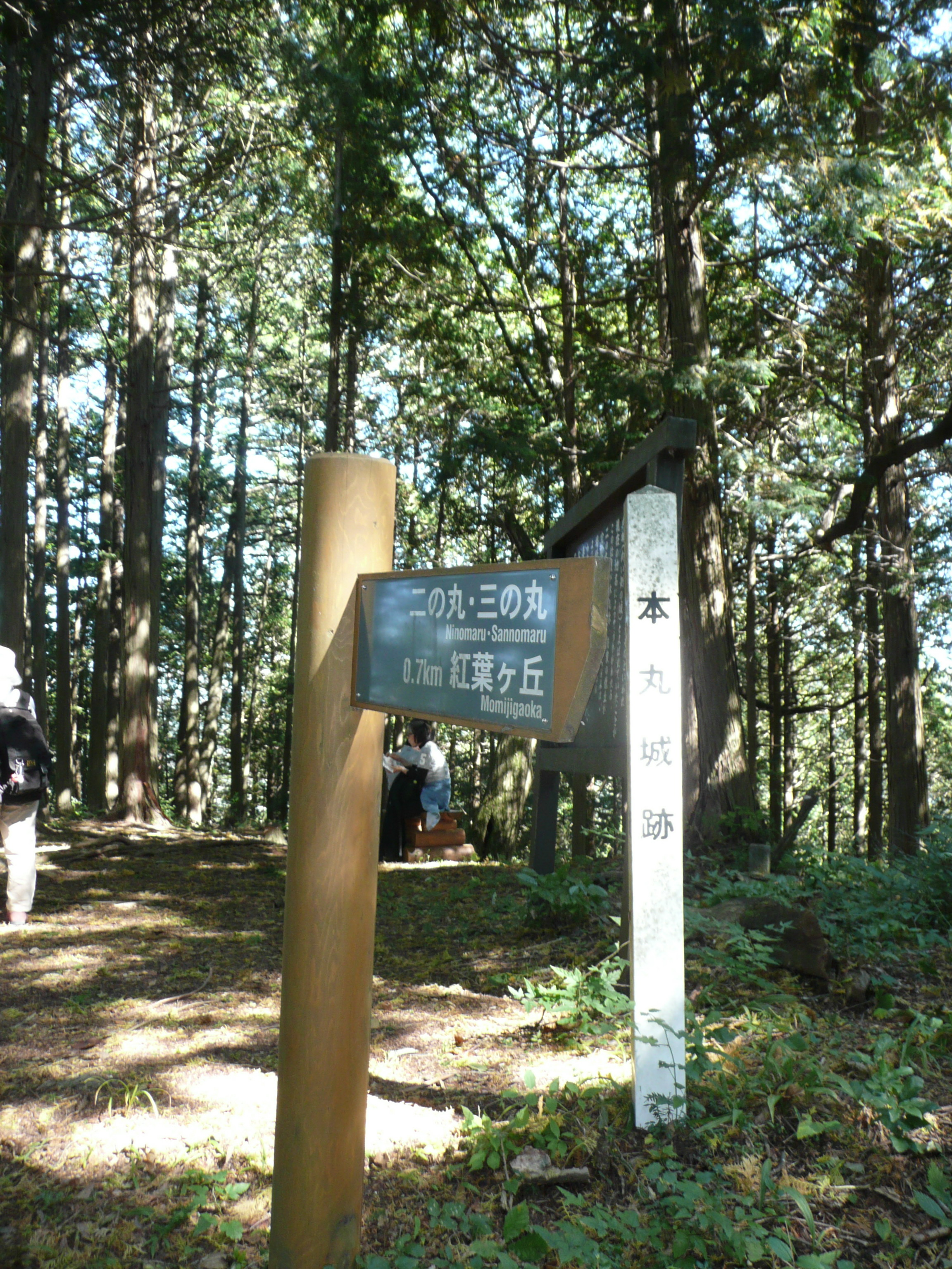 福島城（信濃国）の本丸跡地